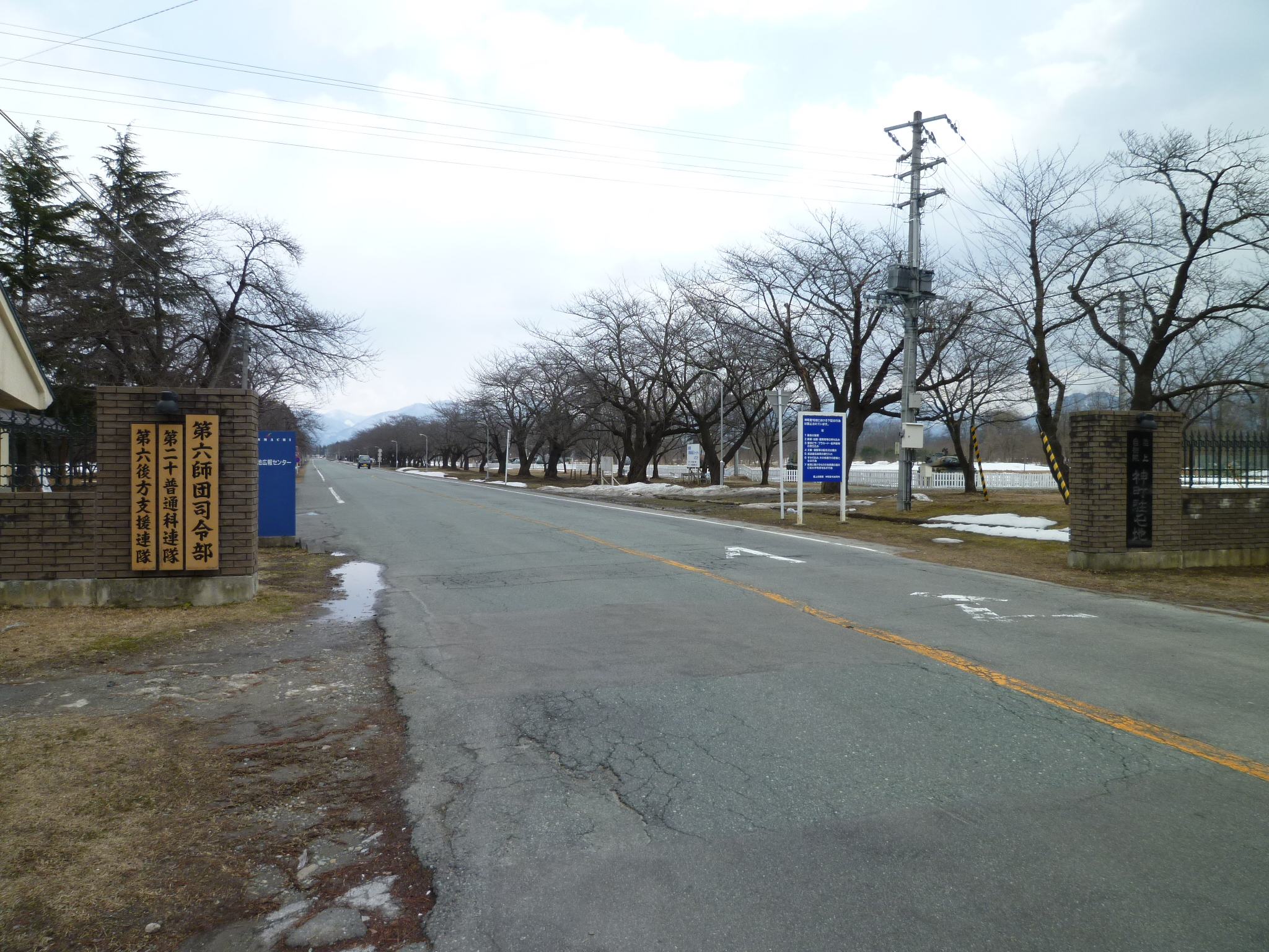 陸上自衛隊神町駐屯地正門。山形県東根市神町南。